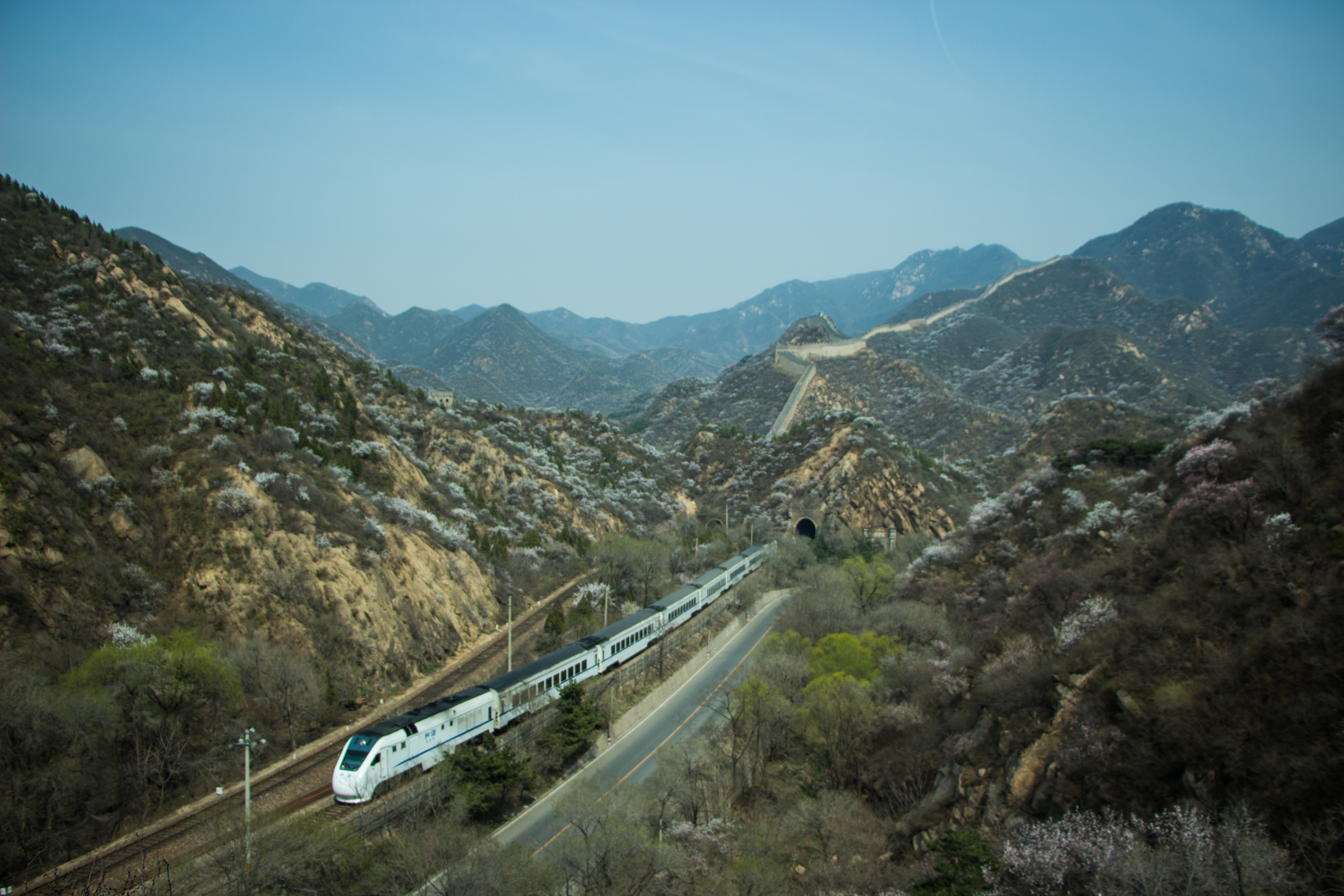 中文（中国大陆）: 一列“和谐长城号”列车行驶在京张铁路南口到八达岭段